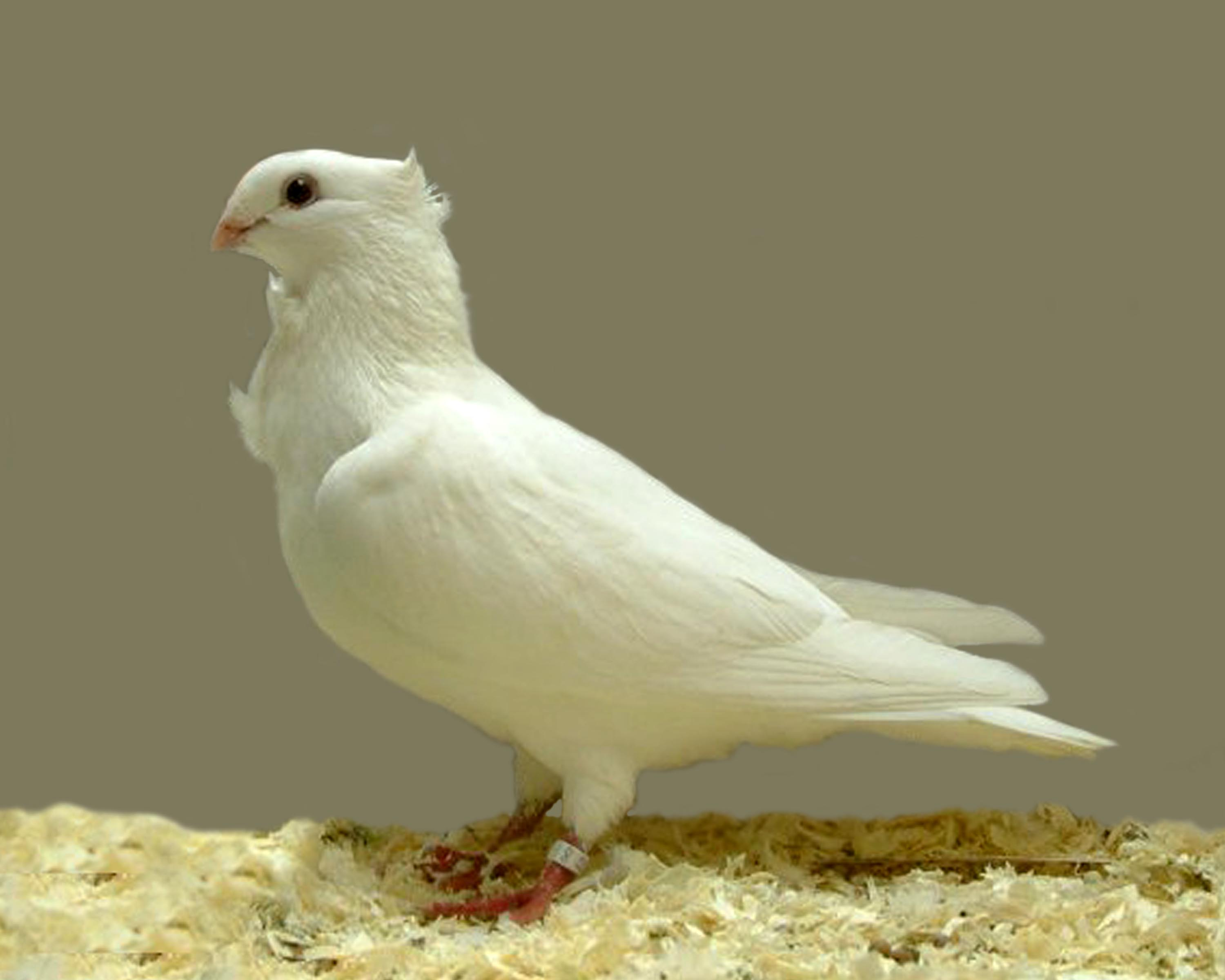 Ghent Owl (White Self)